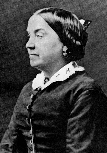 Lizzie Burns (1827-1865), wife of Friedrich Engels